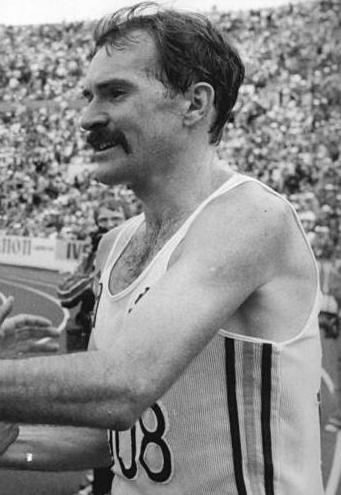 ADN-ZB Mittelstädt 14.8.83 Helsinki: Marathon-Weltmeister Roberto De Castella (Australien).